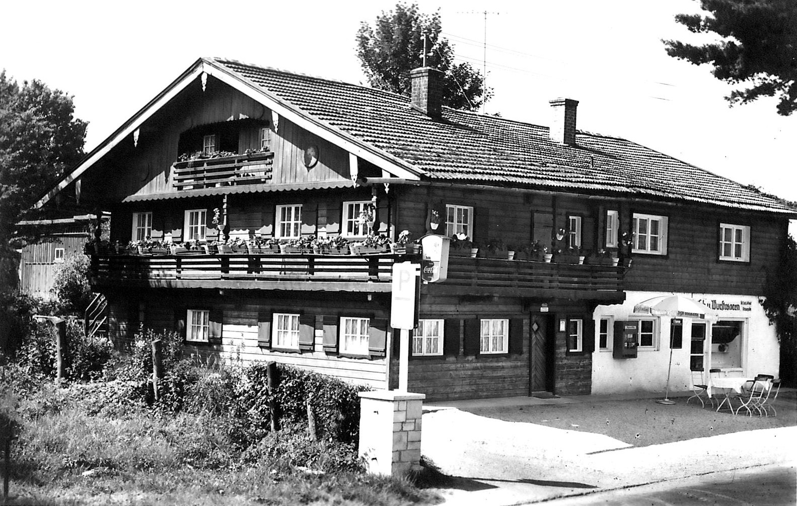 Das Bild zeigt Dorfmetzgerei, Gaststätte und Fremdenzimmer von Korbinian Sedlmair in den 1970 Jahren